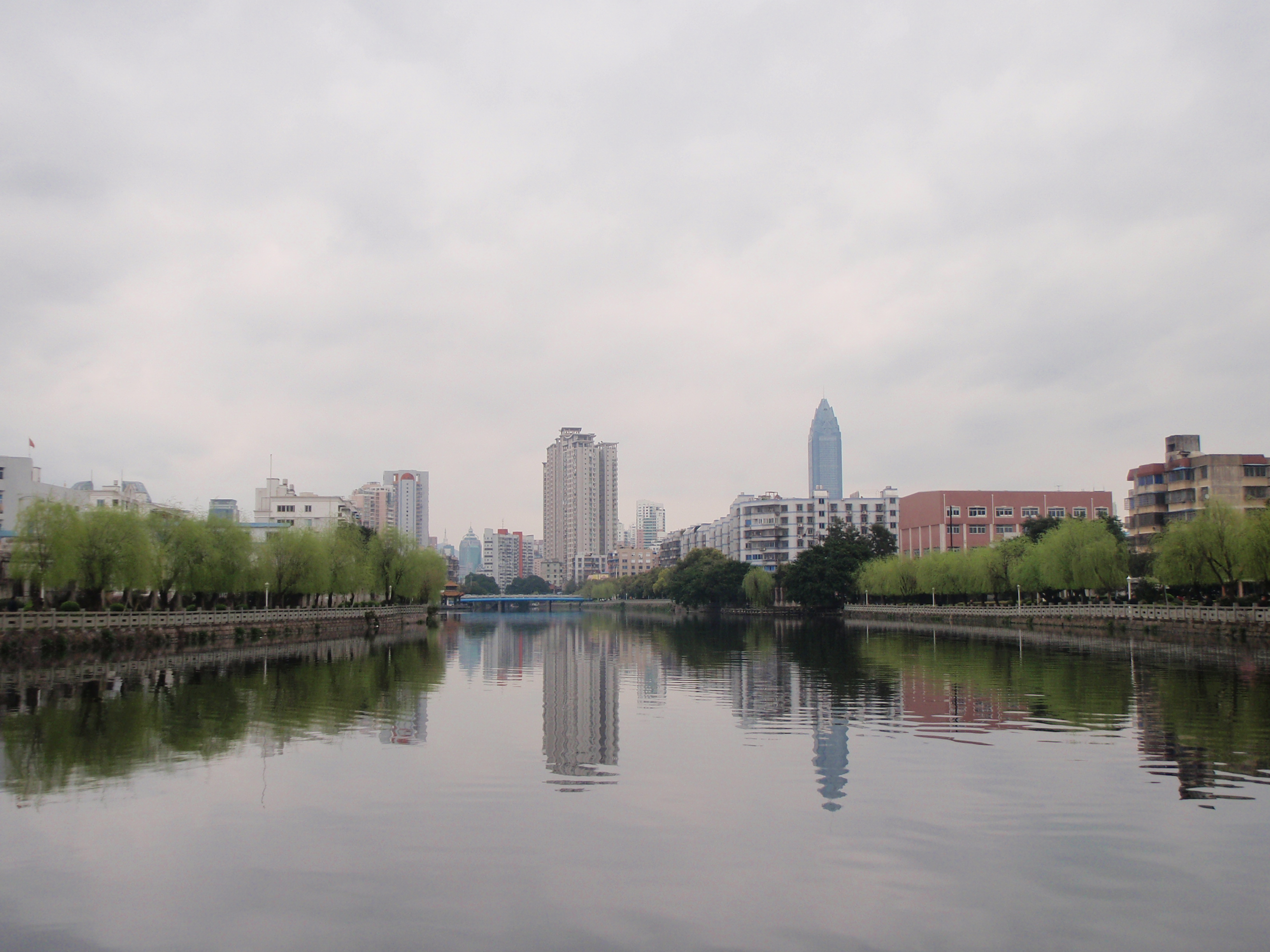 初春的水心河边